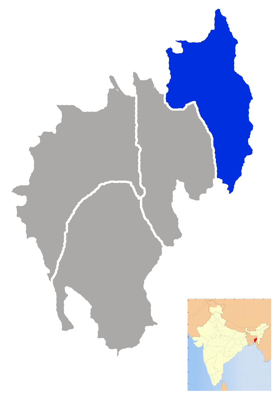 Tripura North district